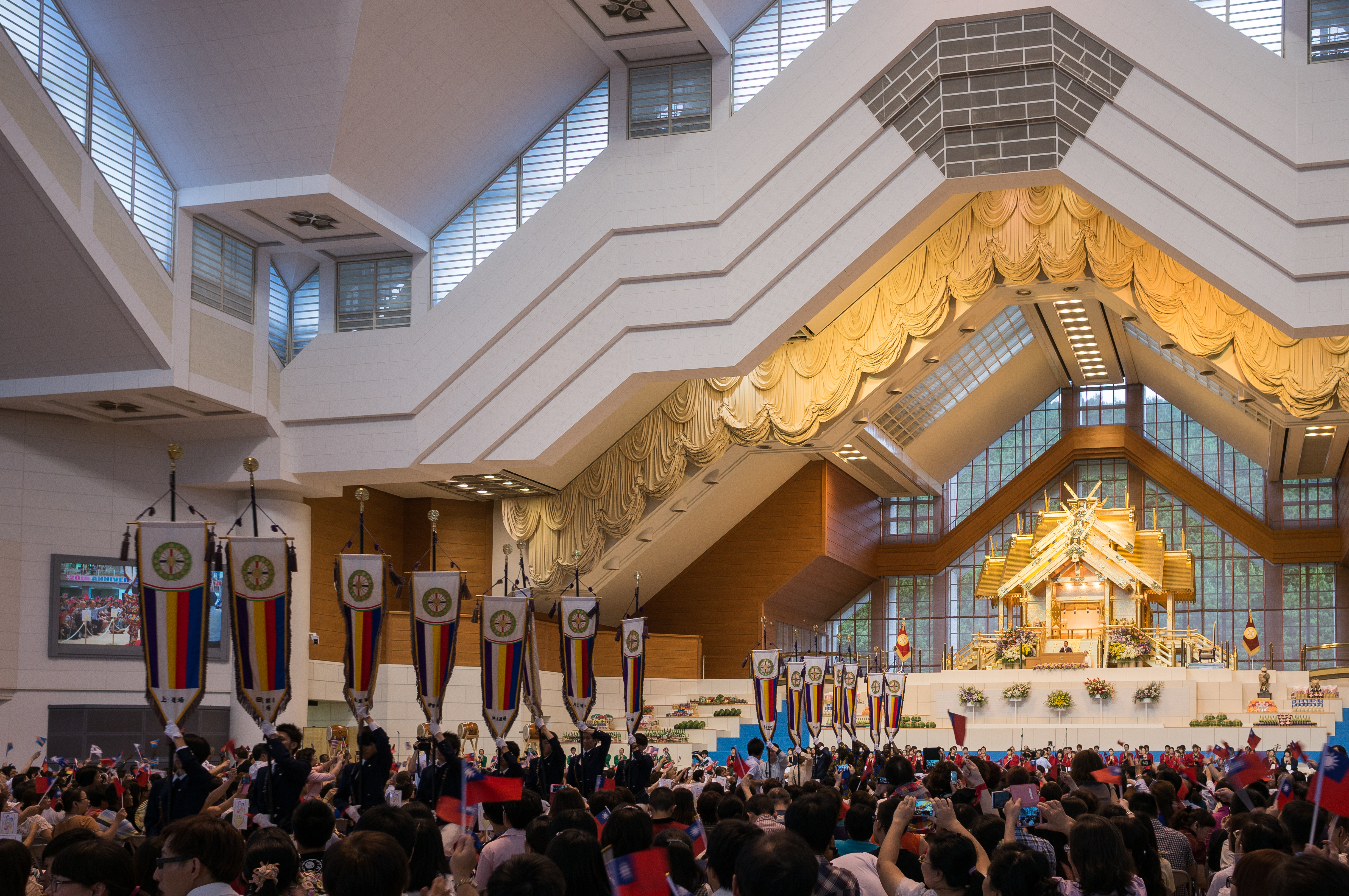 世界真光文明教団の主晃一大神宮のインテリア。